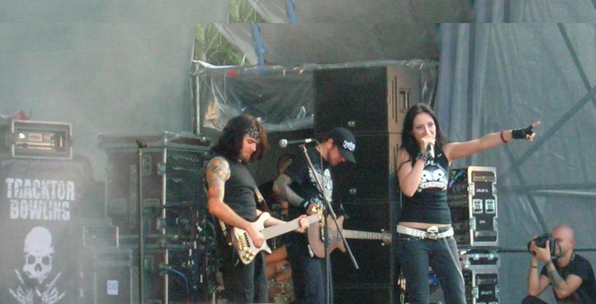 Tracktor Bowling на фестивале Нашествие-2009